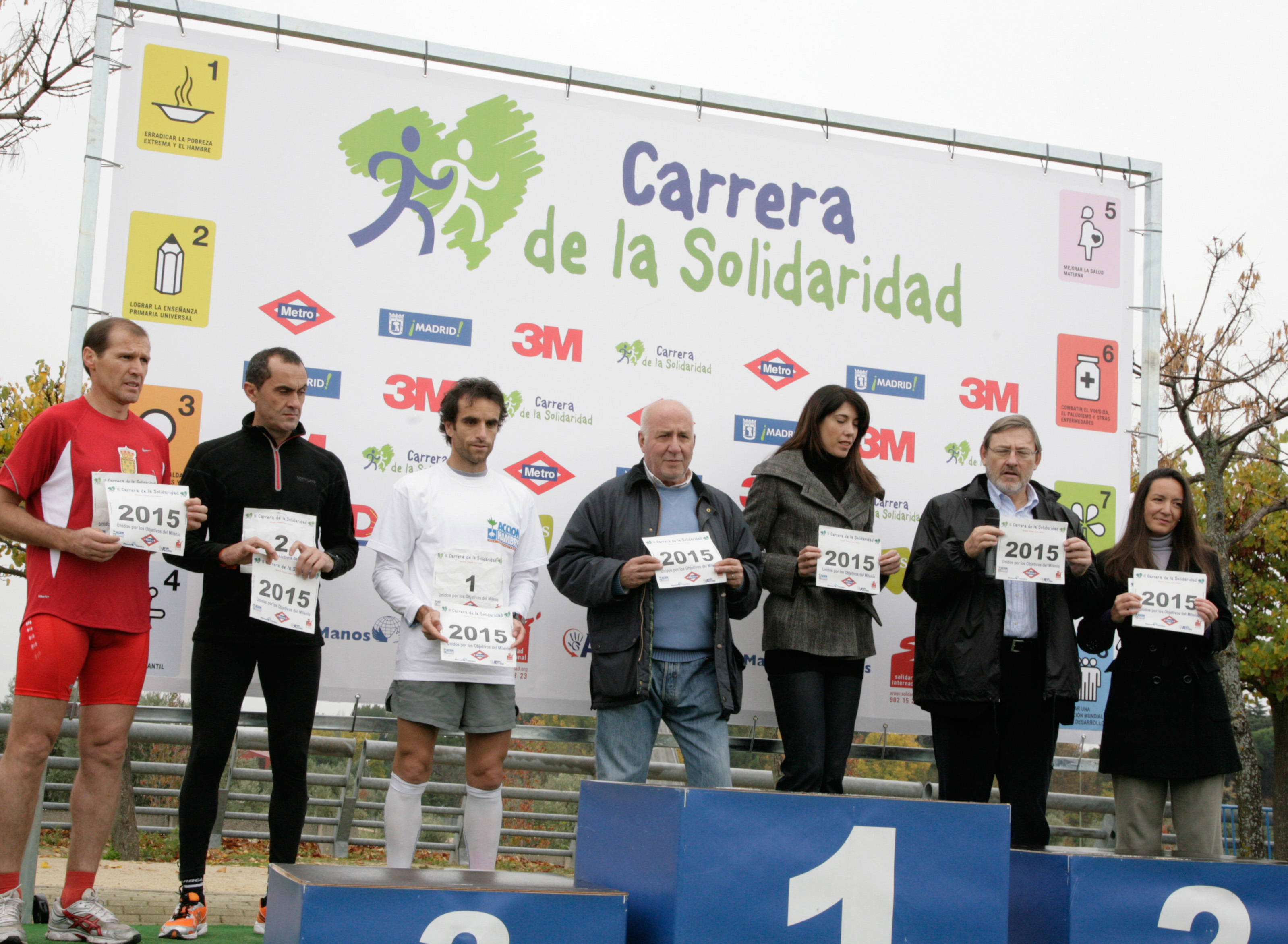 Los Premios Príncipe de Asturias de los Deportes Alberto Juzdado y Fabián Roncero, la Directora de Deportes del Ayuntamiento de Madrid, Mercedes Coghen, el Consejero de Asuntos Sociales de la Comunidad de Madrid, Salvador Victoria Bolívar, y la Coordinadora en España de la Campaña del Milenio de Naciones Unidas, Amalia Navarro piden el cumplimiento de los Objetivos de Desarrollo del Milenio en la Carrera de la Solidaridad 2010.